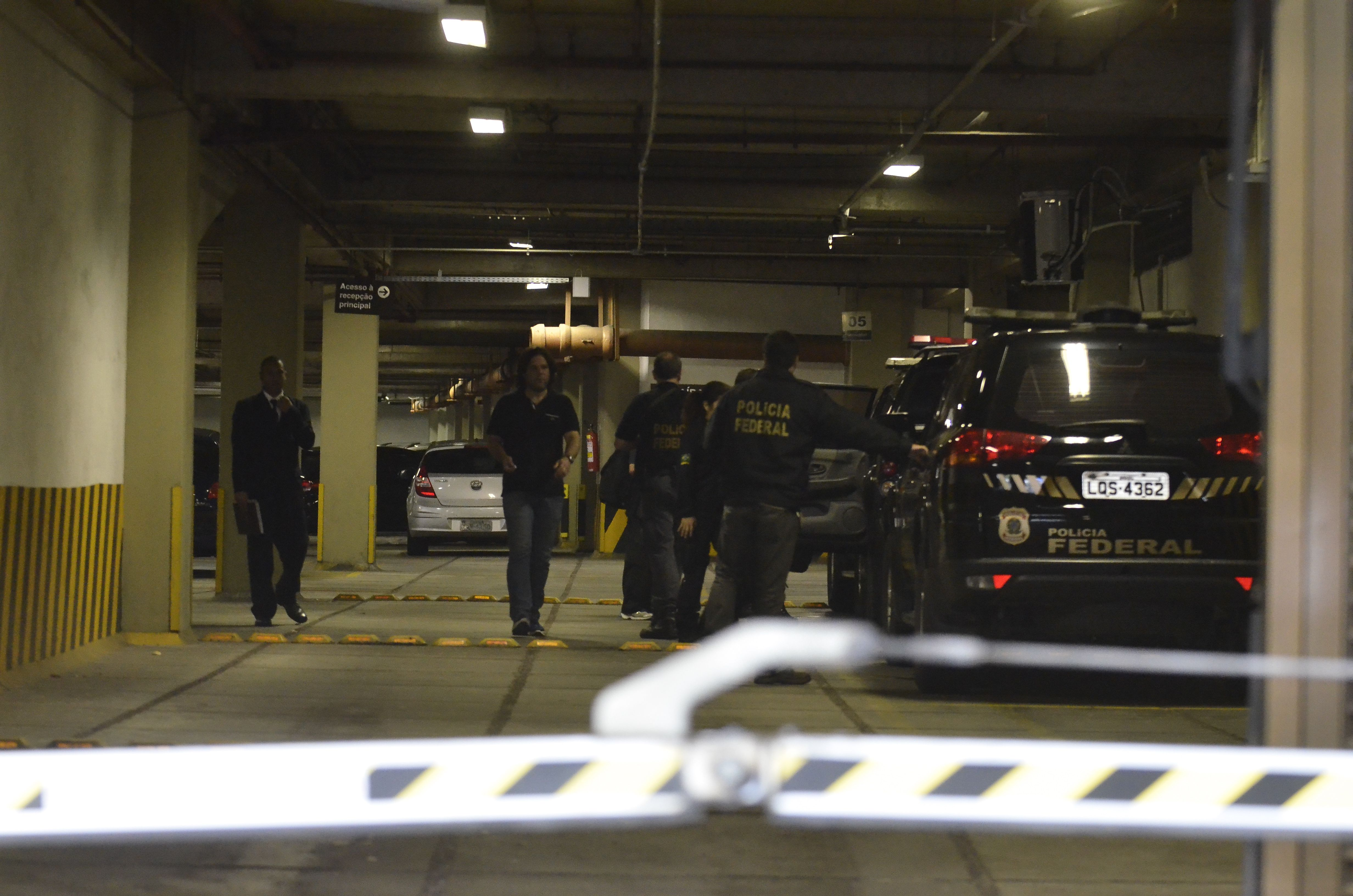 Policiais federais cumprem mandados de busca e apreensão na sede da empreiteira Norberto Odebrecht, no Rio de Janeiro, como parte da 14ª fase da Operação Lava Jato.